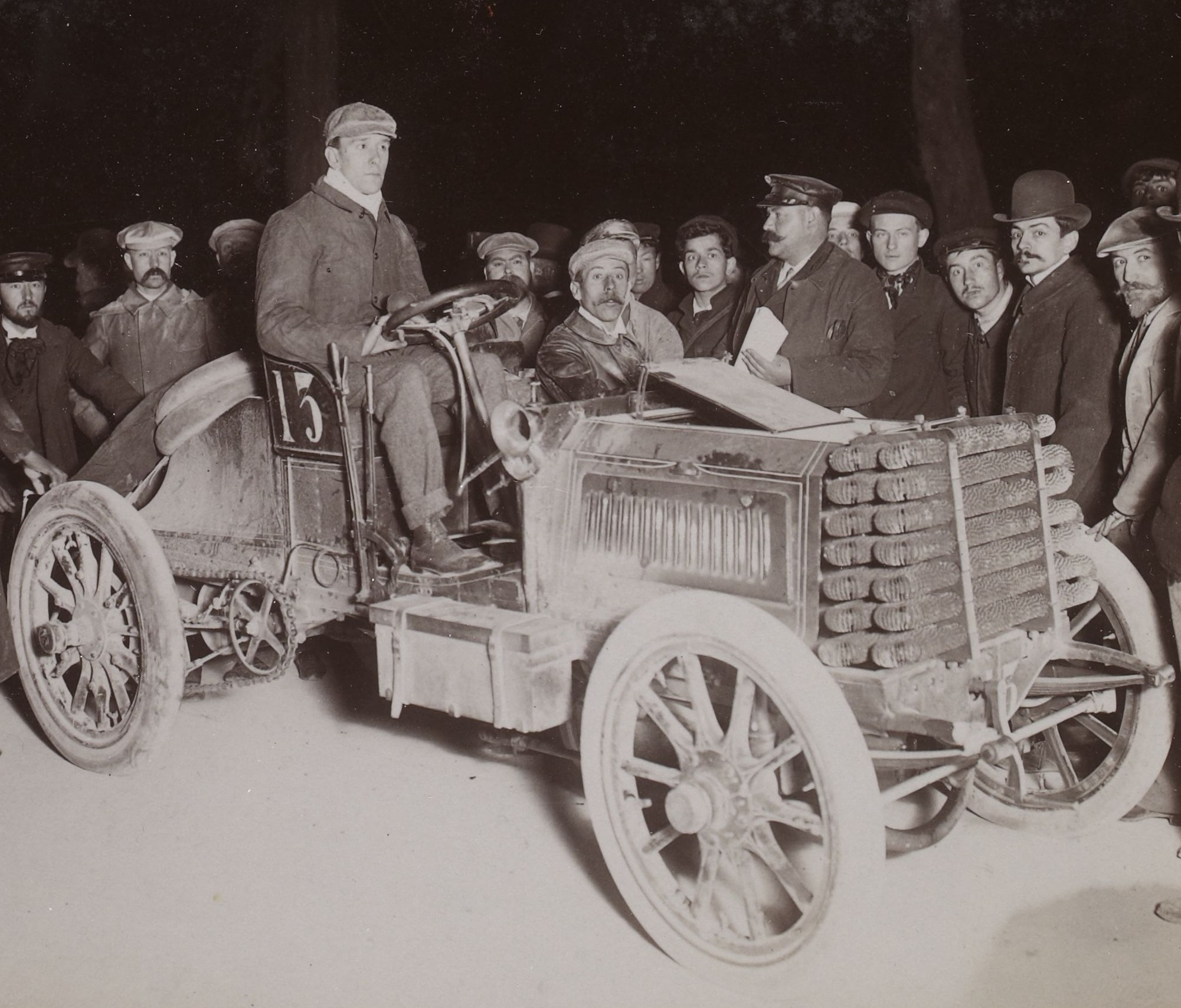 [Collection Jules Beau. Photographie sportive] : T. 14. Année 1901 / Jules Beau : F. 4. [Paris - Berlin, Grande course annuelle de l' Automobile Club de France, Course de vitesse, 27 -29 juin 1901]